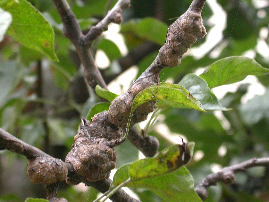 Nodosités dues aux pucerons lanigères - Eriosoma lanigerum